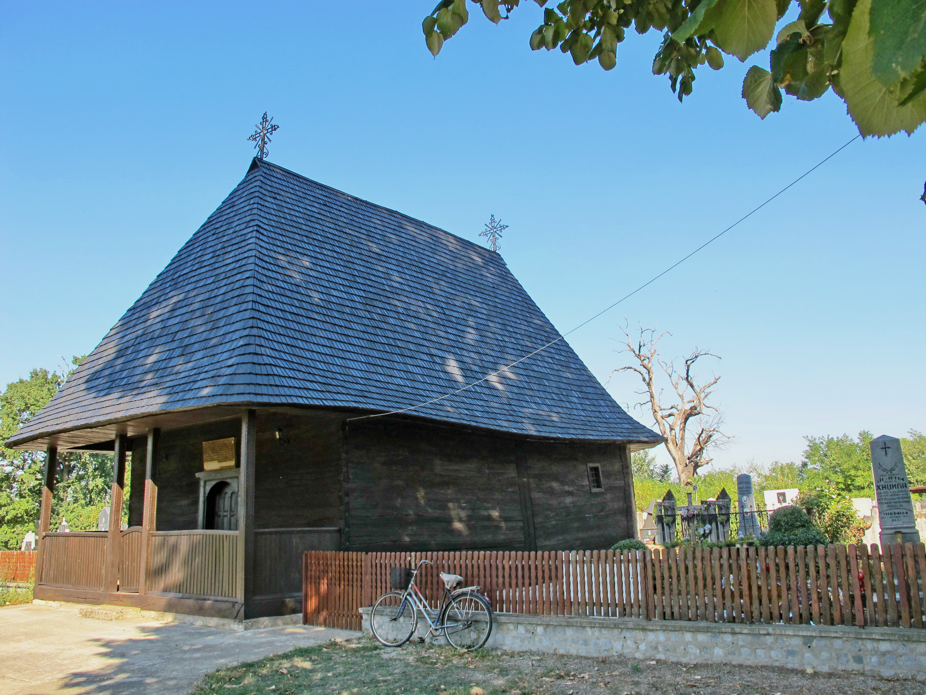 Lozovik, crkva svetog Petra i Pavla